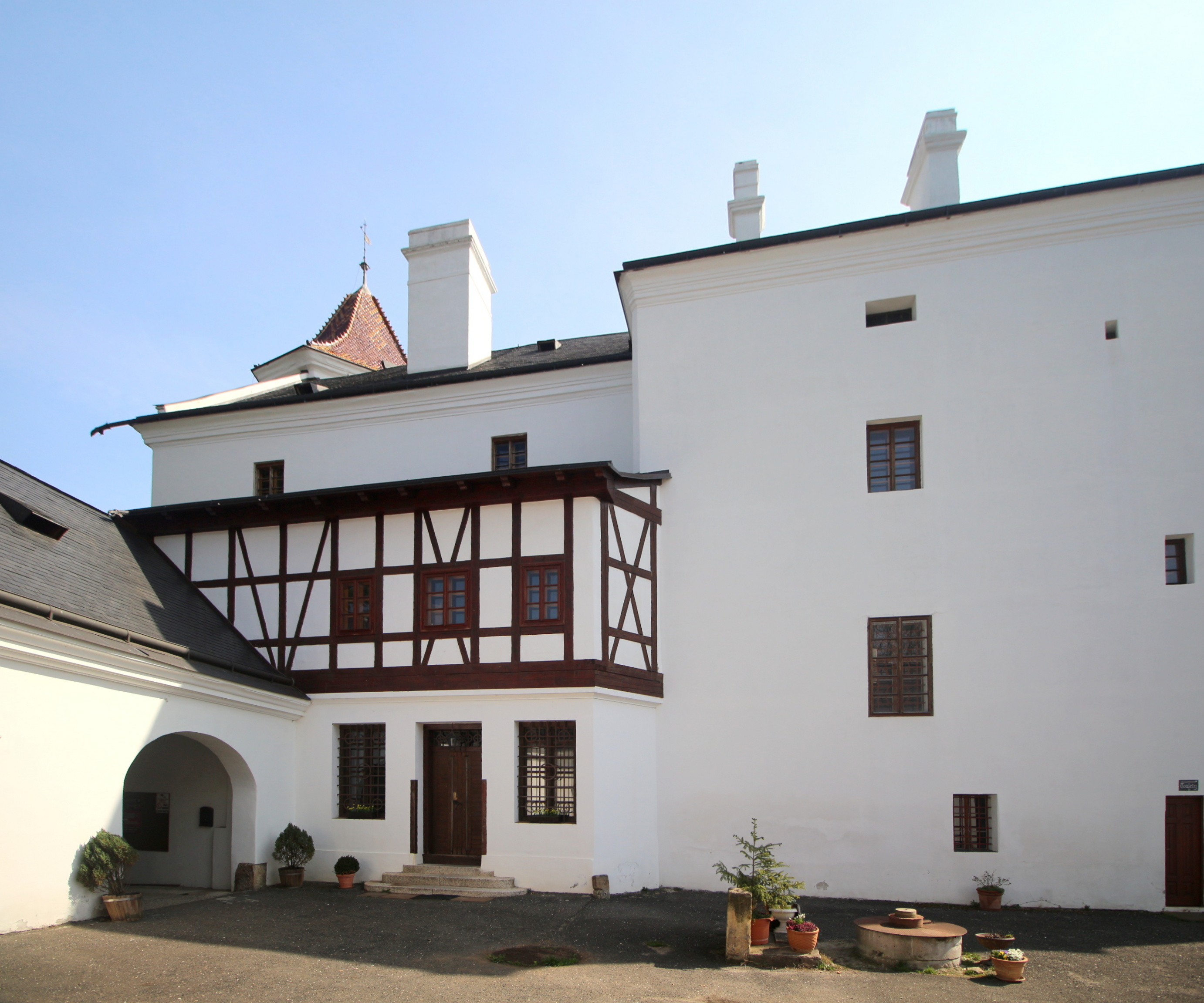 Radim zámek, dvůr